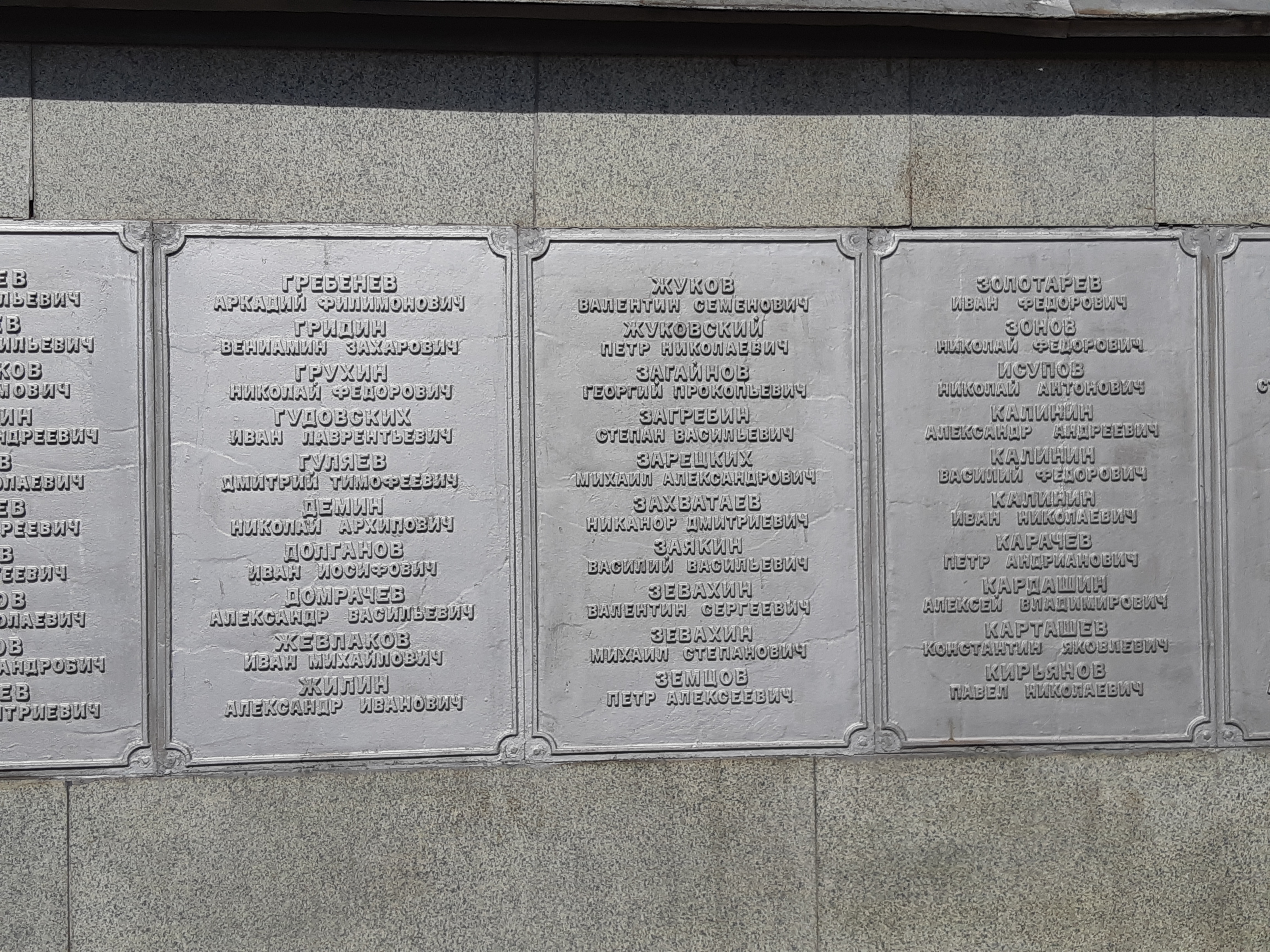 Вятские Герои (Г-З) на мемориальной доске в парке дворца пионеров. Киров 2019.